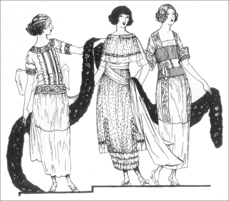 Day dresses for summer 1919 from Vogue magazine